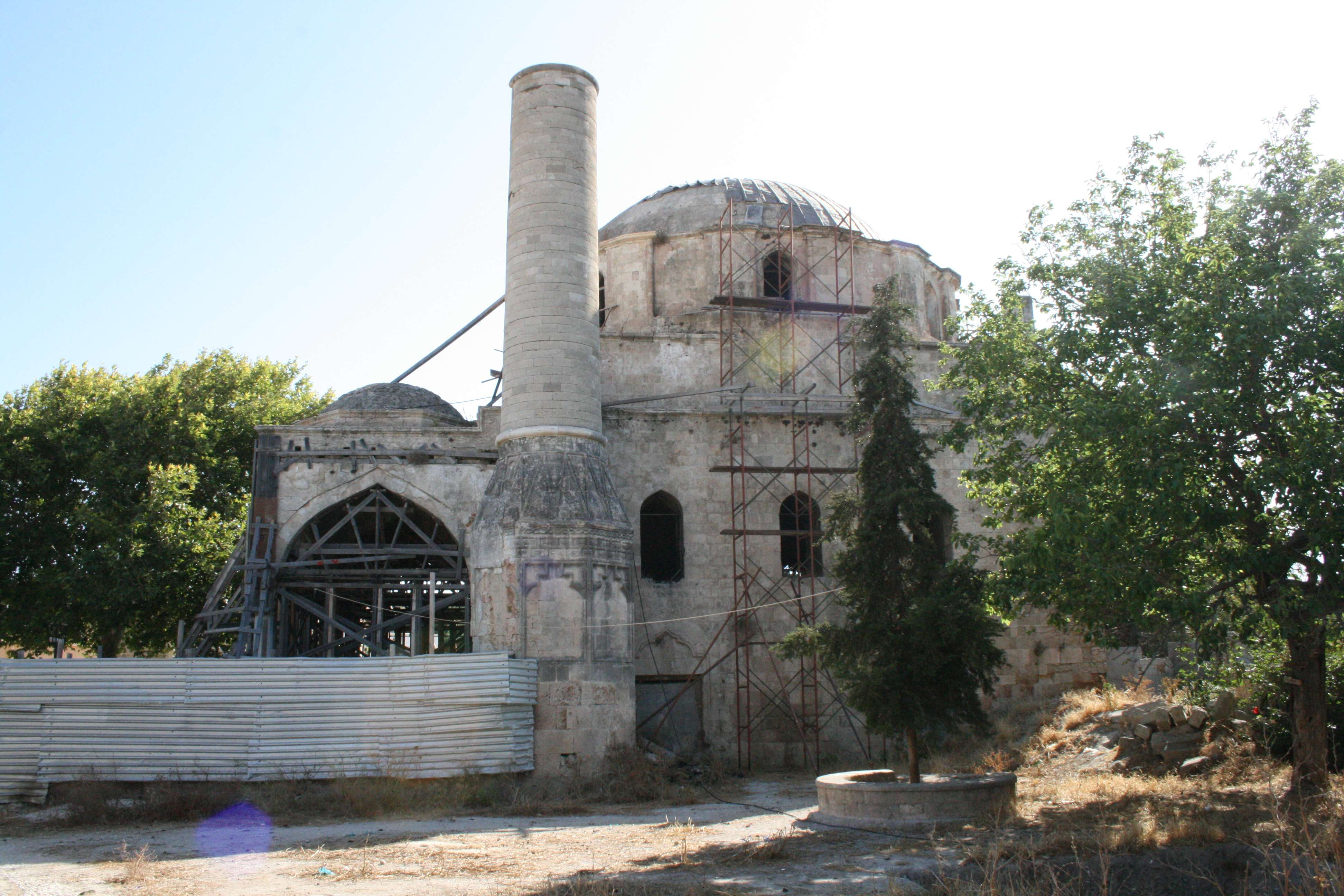 Rodi: Moschea di Radjeb Pascià